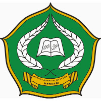 Logo IAIN Kendari